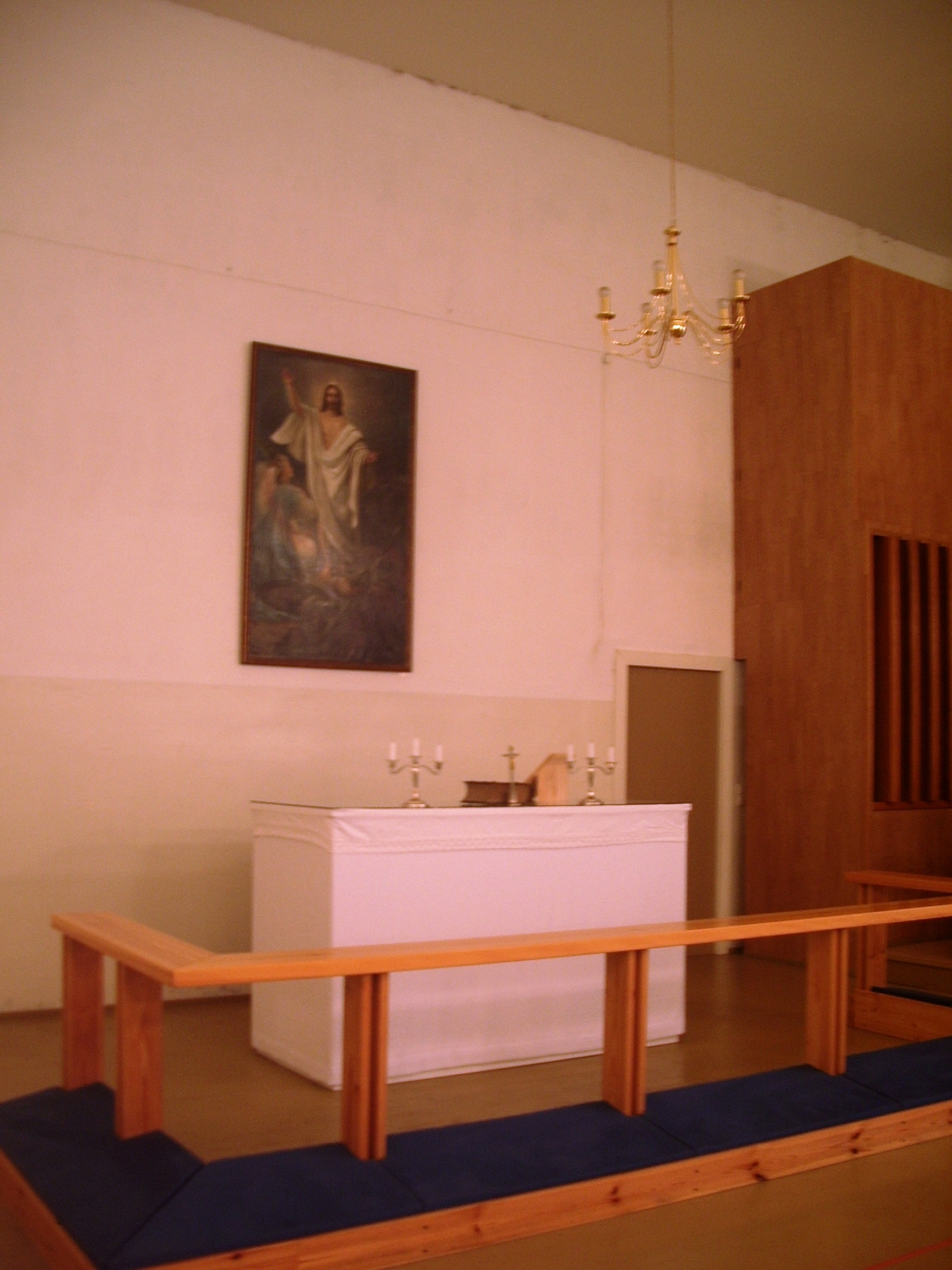 EELK Paldiski Nikolai kiriku altar